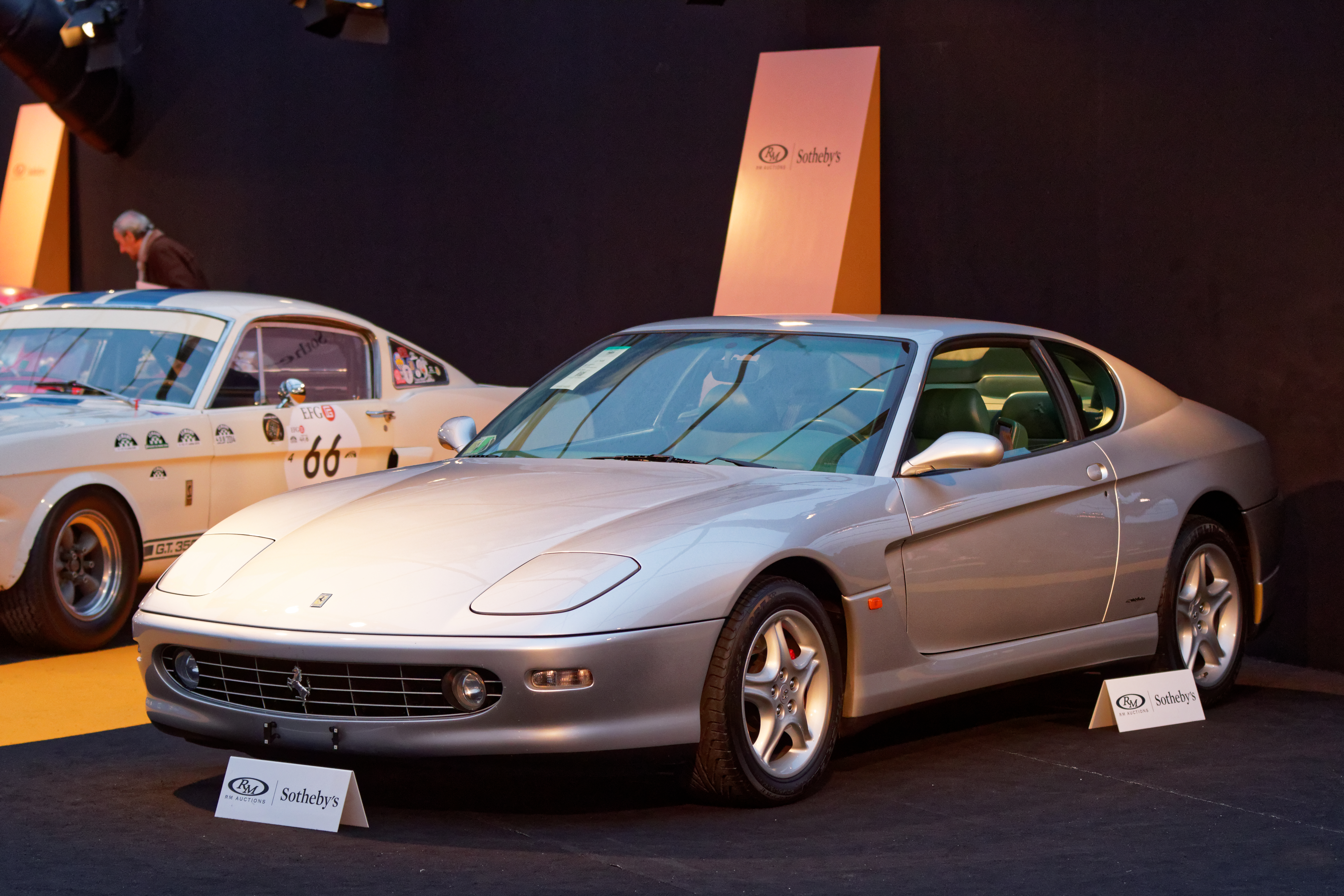 Une Ferrari 456M GTA de 1999 exposée lors de la vente RM Sotheby’s 2016 aux Invalides à Paris.